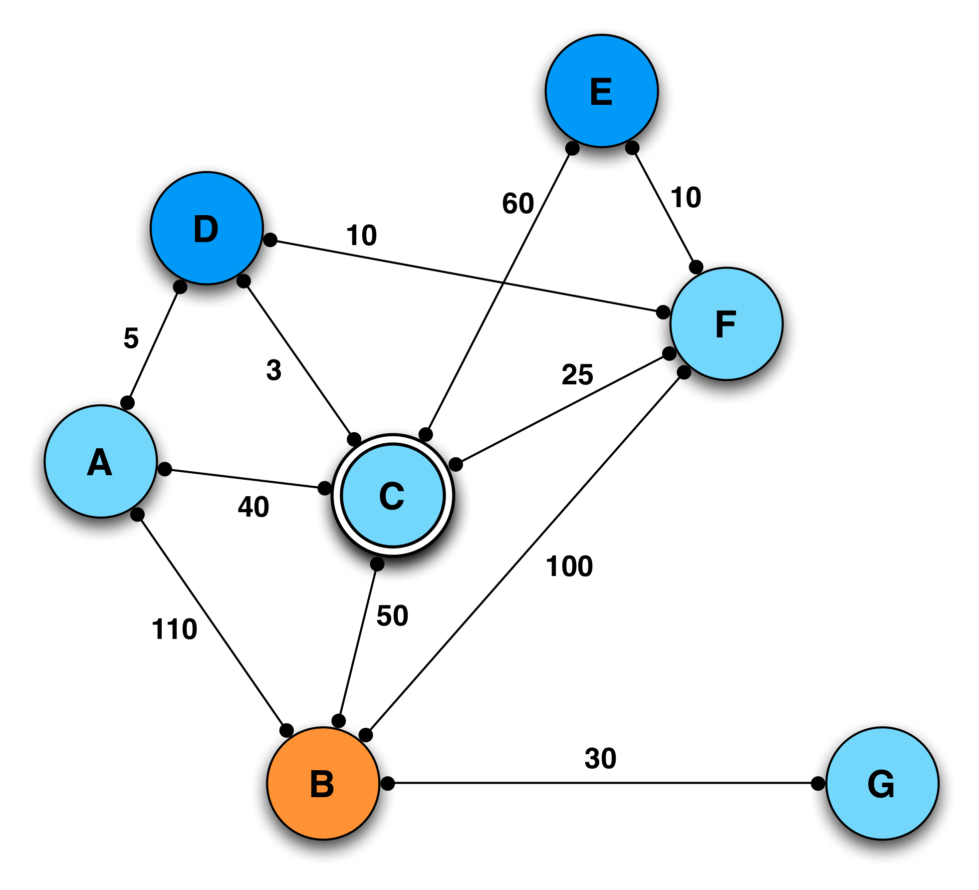 Sélection normale d'un MPR